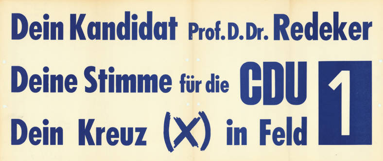 Dein Kandidat Prof. D. Dr. Redeker Deine Stimme für die CDU Dein Kreuz (X) in Feld 1 Abbildung: Stimmkreuz Plakatart: Kandidaten-/Personenplakat ohne Porträt Objekt-Signatur: 10-012:217 Bestand: Landtagswahlplakate Schleswig-Holstein ( 10-012) GliederungBestand10-18: Landtagswahlplakate Schleswig-Holstein (10-012) » CDU Lizenz: KAS/ACDP 10-012:217 CC-BY-SA 3.0 DE